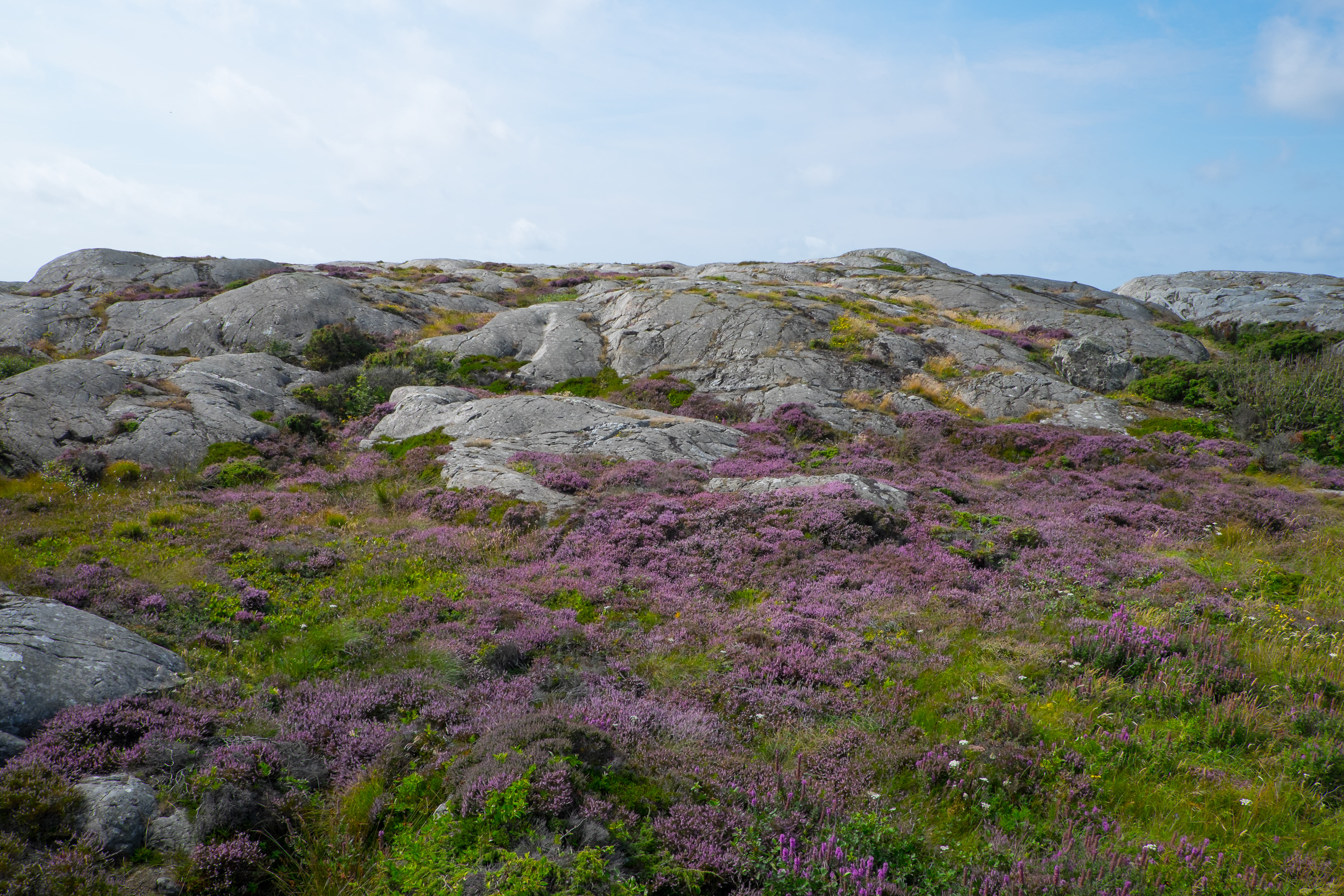 Ljung på Väderöarna, Bohuslän